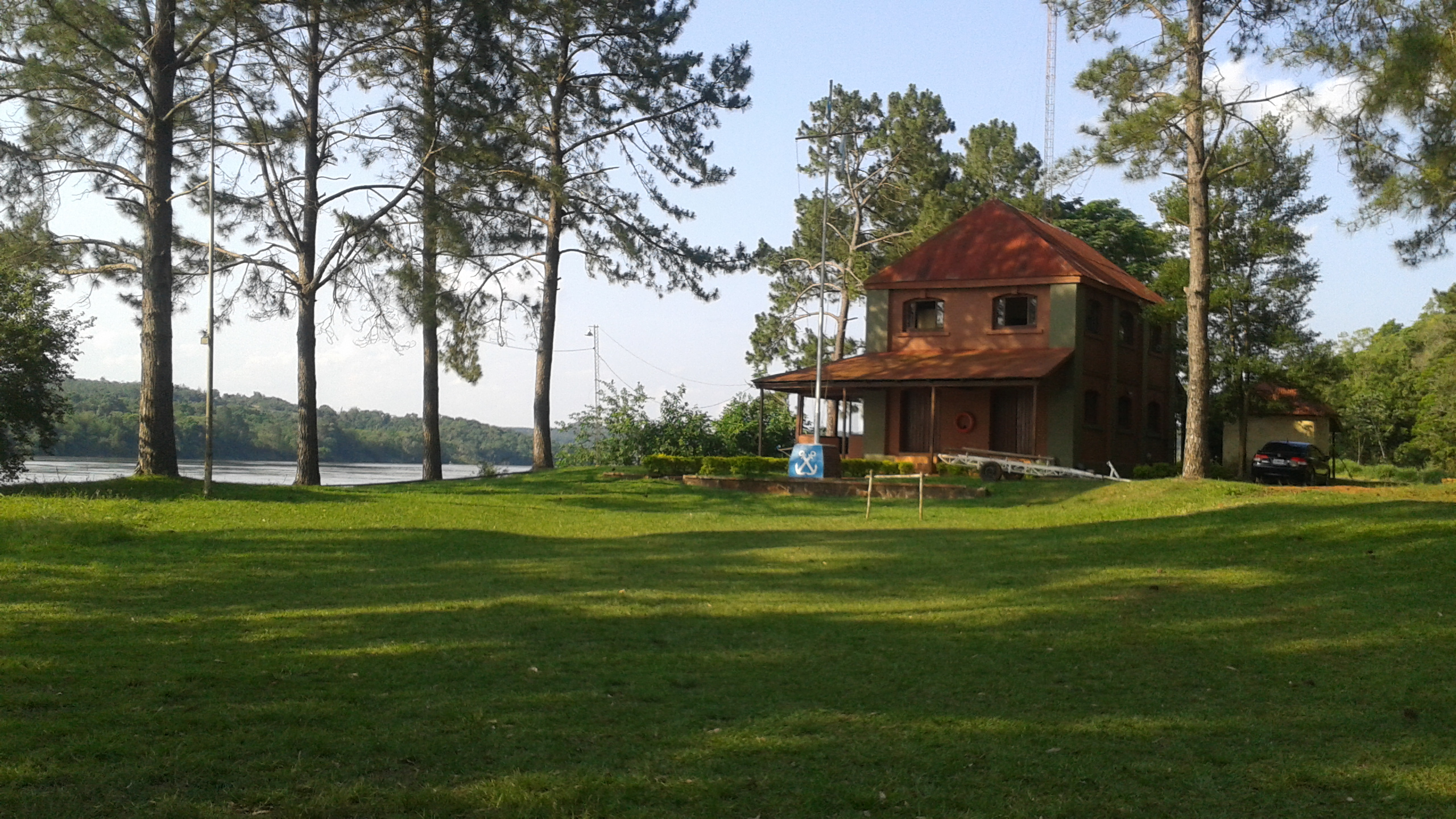 Prefectura Naval Argentina en Puerto Mineral (Provincia de Misiones, Argentina). Fuente: Periodista Horacio Cambeiro.